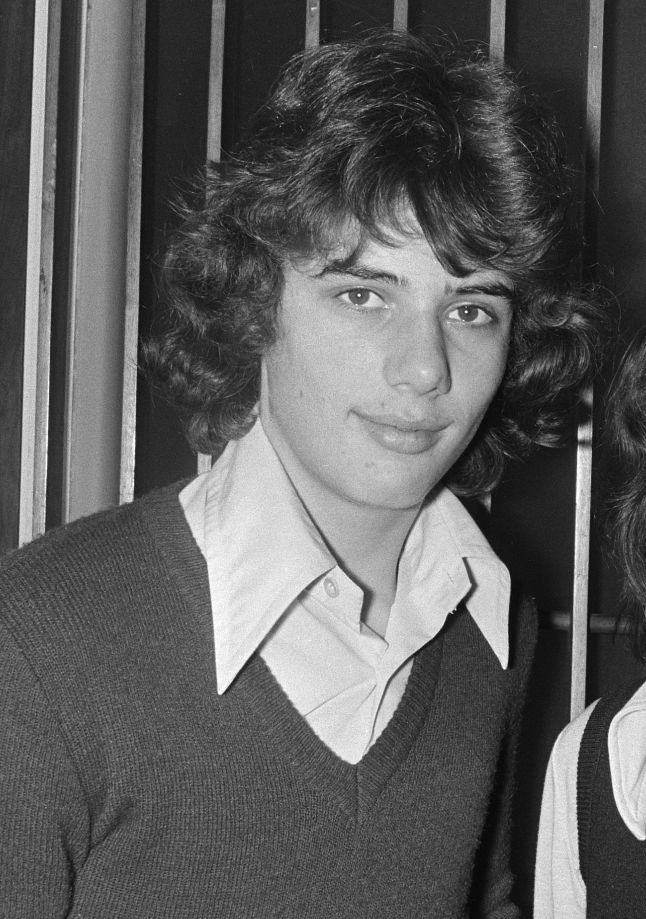 Collectie / Archief : Fotocollectie Anefo Reportage / Serie : [ onbekend ] Beschrijving : Presentatie Sportfonds Leo van de Kar in Apollohotel Amsterdam. Drie jonge sporters Annotatie : Opdracht Parool. Datum : 5 februari 1975 Locatie : Amsterdam, Noord-Holland Trefwoorden : sporters Instellingsnaam : Parool, Het, Stichting Sportfonds Leo van de Kar Fotograaf : Bogaerts, Rob / Anefo Auteursrechthebbende : Nationaal Archief Materiaalsoort : Negatief (zwart/wit) Nummer archiefinventaris : bekijk toegang 2.24.01.05 Bestanddeelnummer : 927-7343